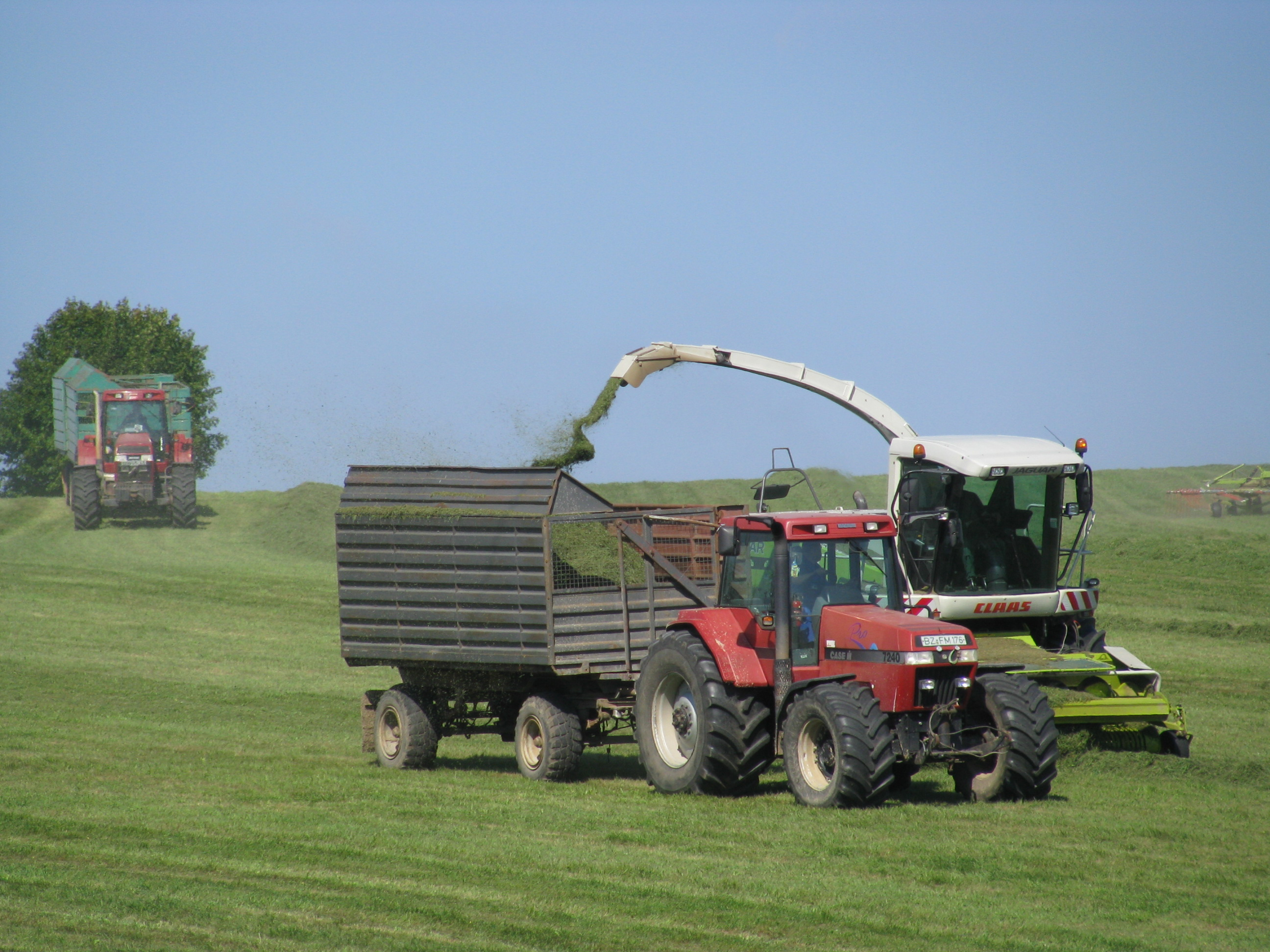 Erntemaschinen in Rammenau